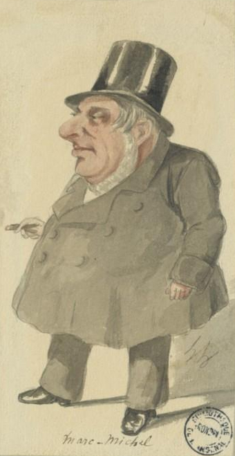 Marc-Michel : portrait par Lhéritier